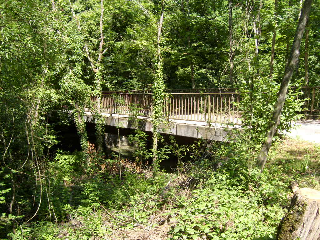 Passerelle du Bois de Merdisel à Satigny (Suisse)